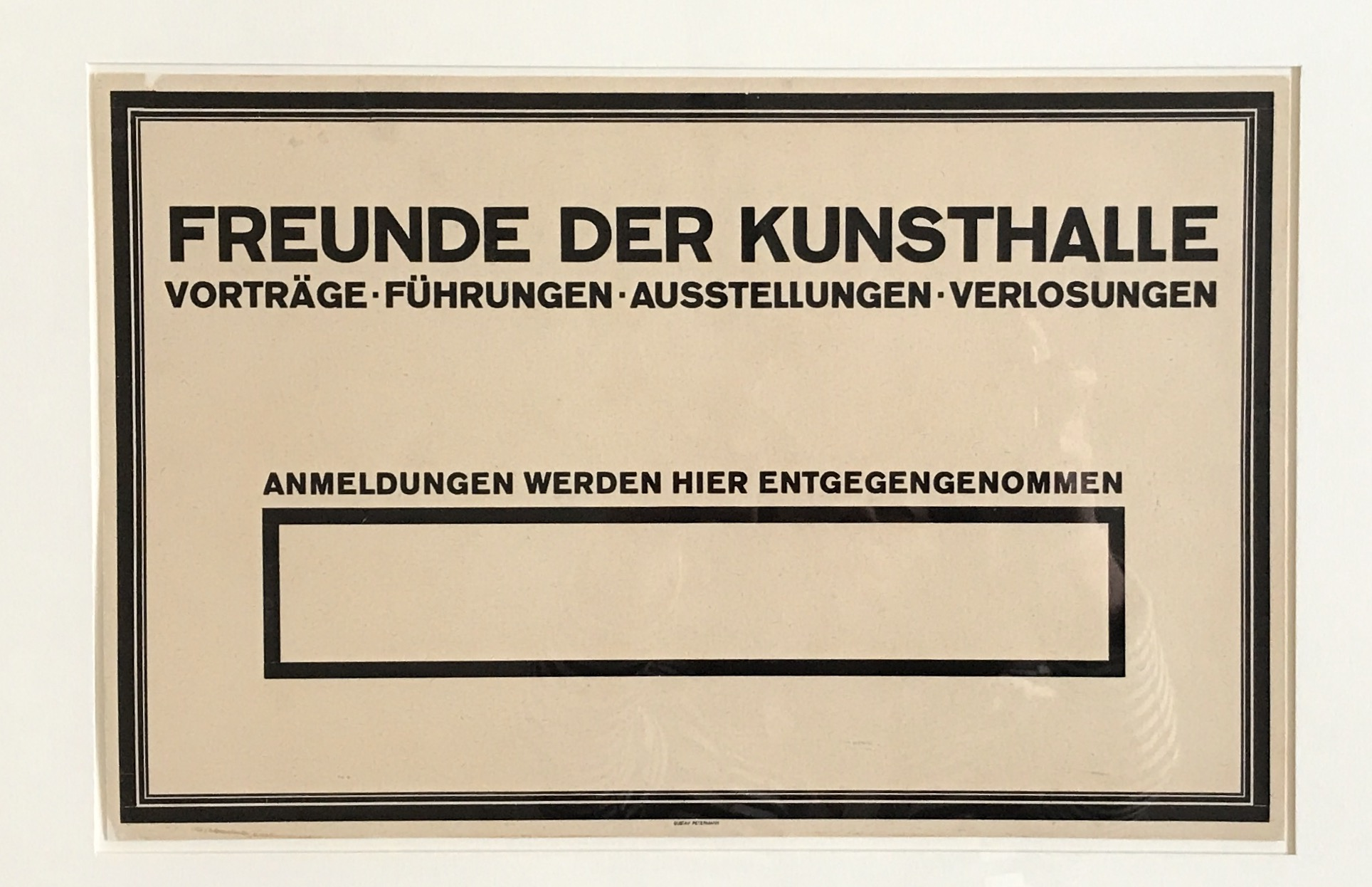 Aufforderung zum Vereinsbeitritt aus den 20er-Jahren.